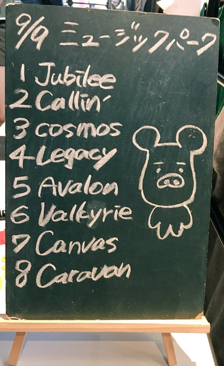 amiinAセトリボード(20180909(1))